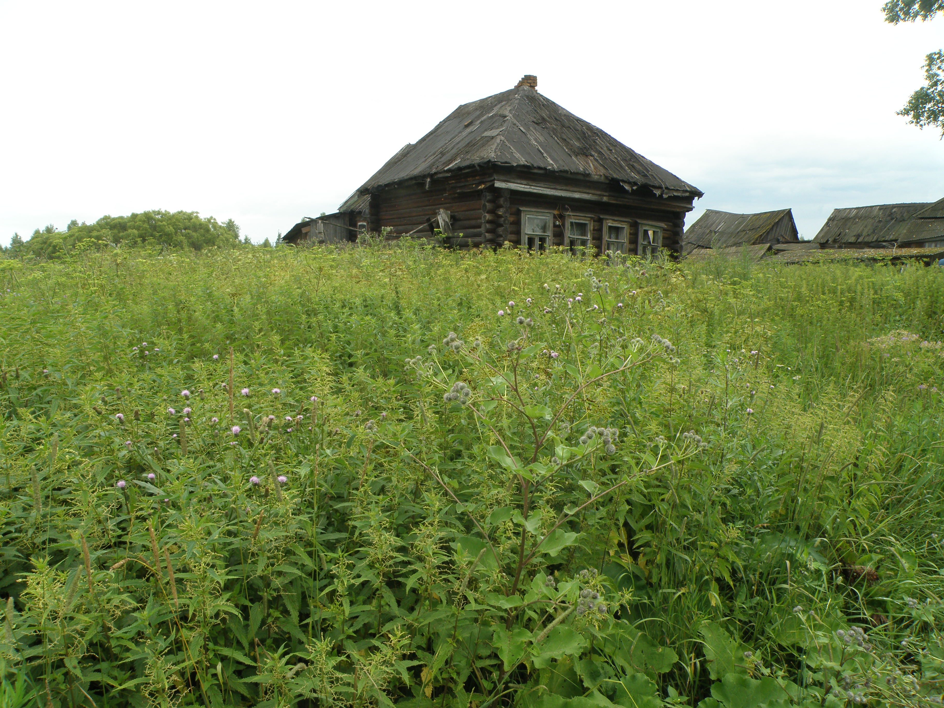 Почти обезлюдевшая д. Михали